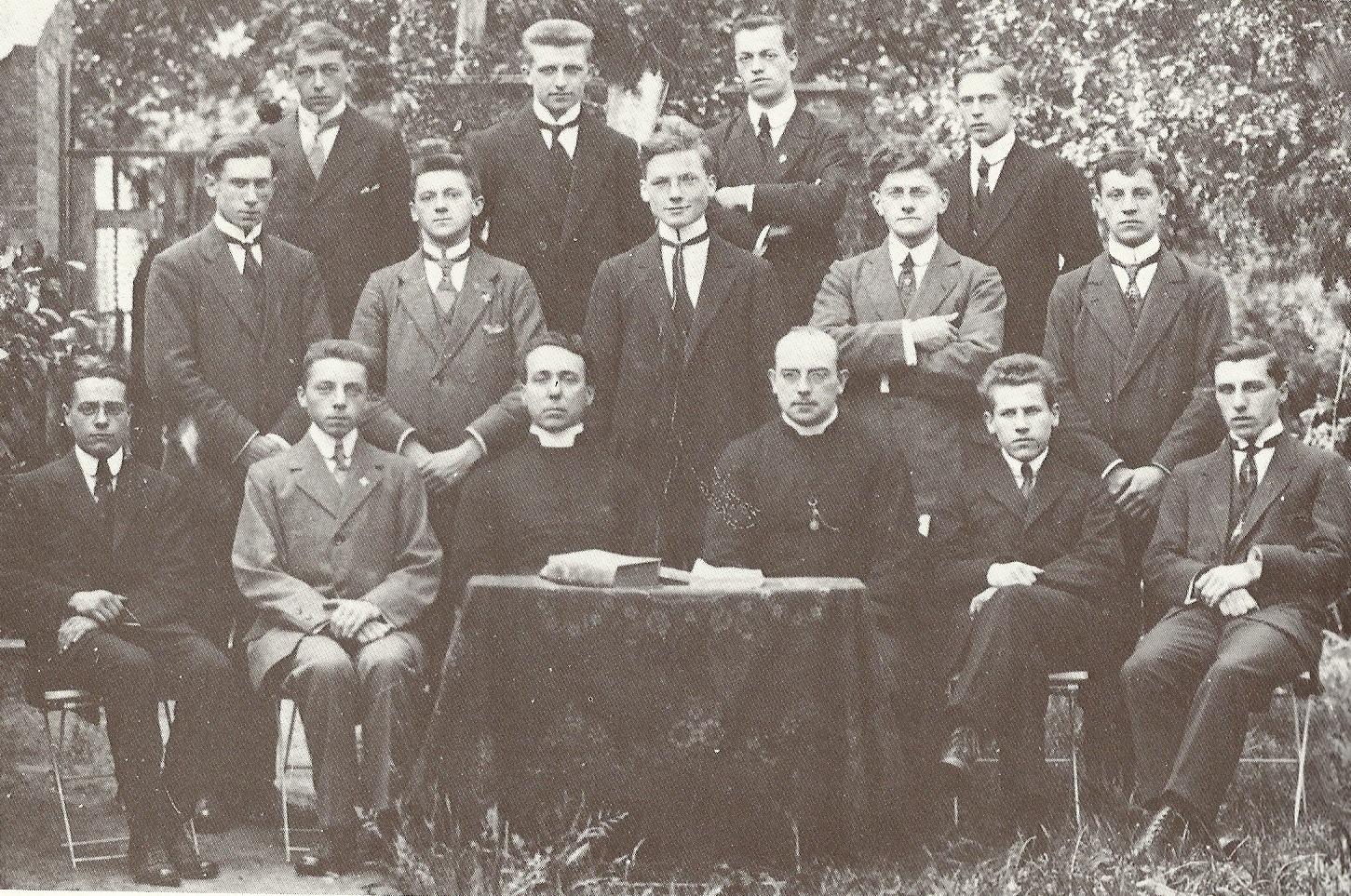 De retorica 1920-1921 - Sint-Vincentiuscollege - Eeklo - Oost-Vlaanderen - België